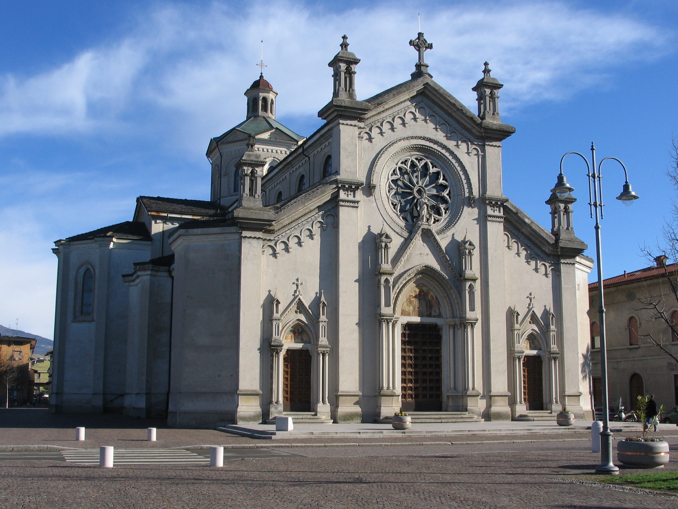 Autore Giorces. Bonate Sotto, la Parrocchiale del S. Cuore.